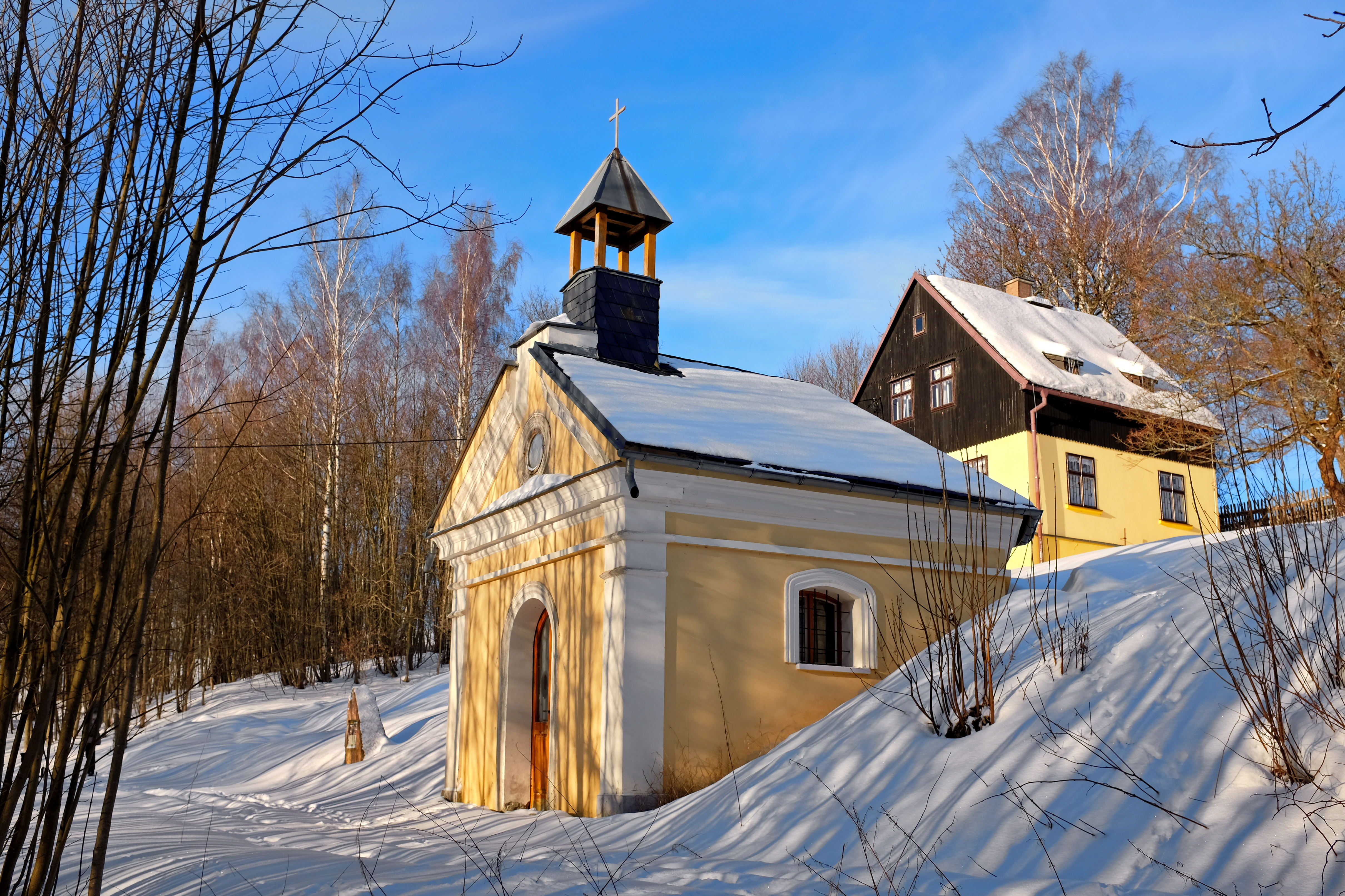 Krásná, část města Kraslice, kaple Nejsvětější Trojice, okres Sokolov